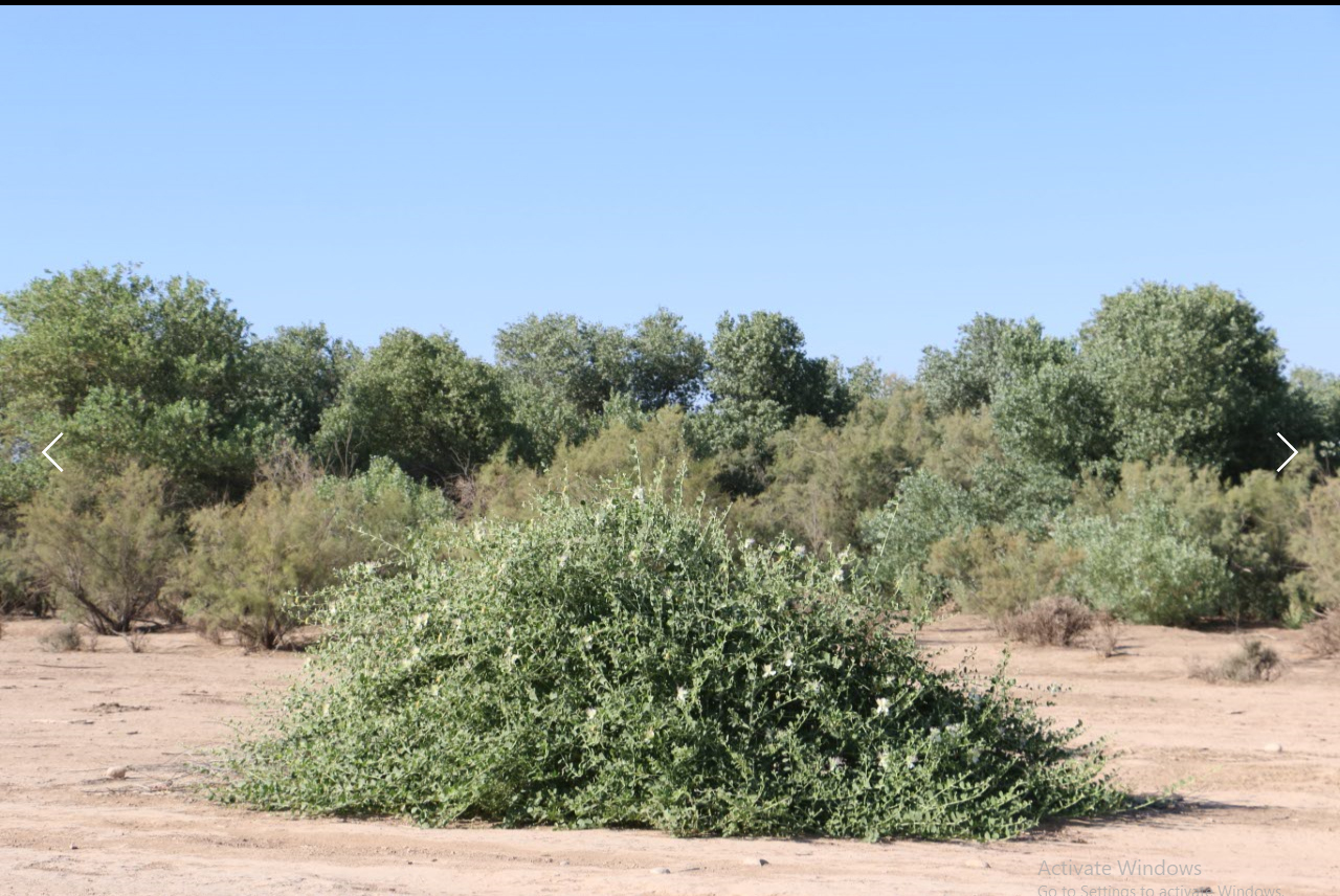 لگجی و یا هندوانه وحشی یا شِفِلّح (به عربی) نام این گیاه است که از سطح پوششی خوبی در پارک ملی کرخه برخوردار است . پرندگان منطقه ضمن خوردن میوه گیاه با دفن دانه های میوه از طریق مدفوع باعث گسترش این گیاهان به دیگر نقاط جنگل می شوند . همچنین زنبور ها از شهد گل های سفید این گیاهان برای ساخت عسل استفاده می کنند.